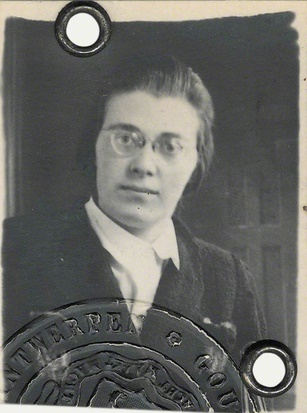 Passfoto (vermutlich um 1939) aus dem Bestand des Deutschen Exilarchivs 1933-1945 der Deutschen Nationalbibliothek, Nachlass Emma Kann EB 91/053